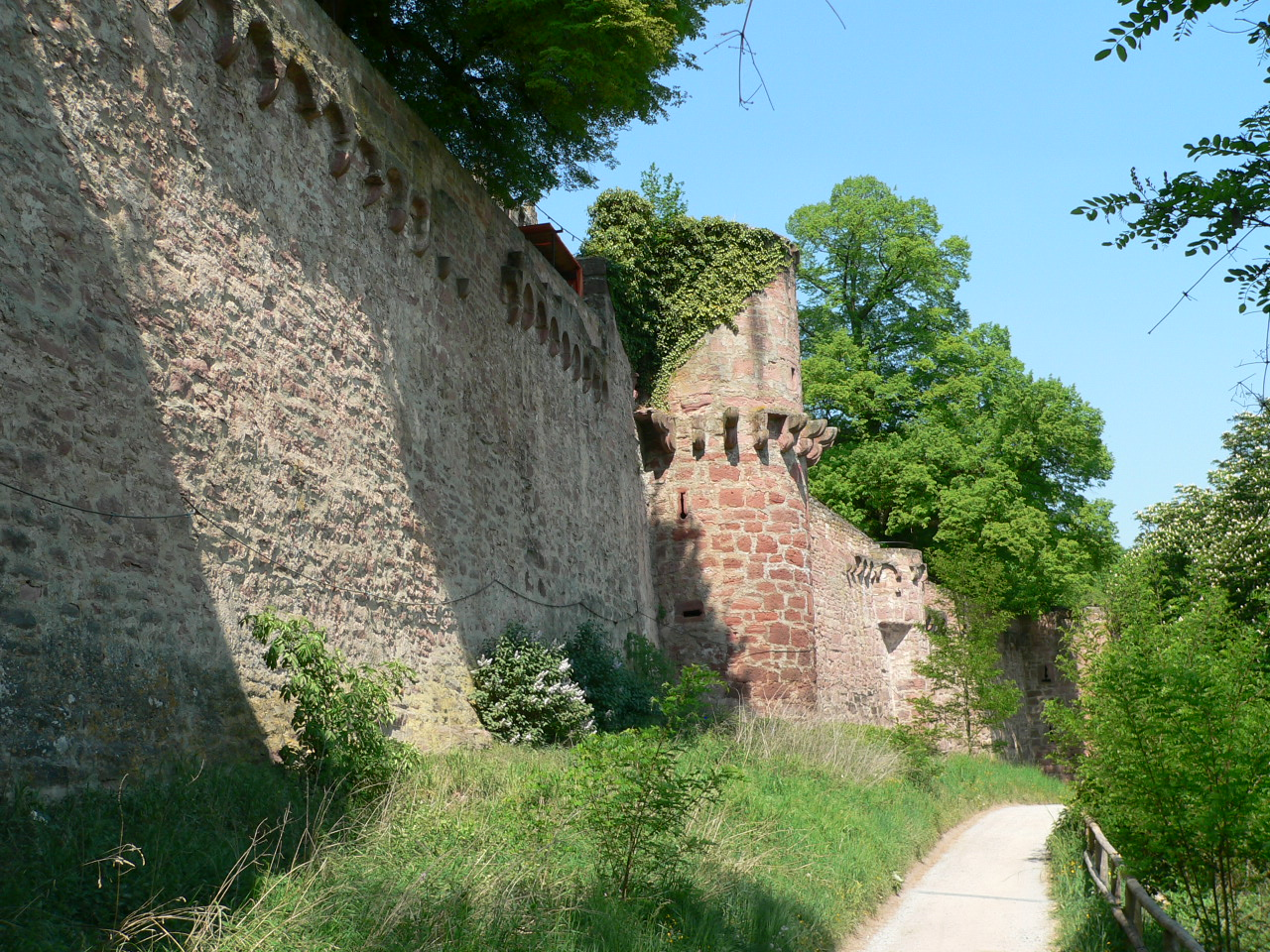 Henneburg oberhalb von Stadtprozelten am Main, Germany - östliche Ringmauer